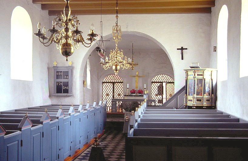 Højbjerg Kirke, kirkerummet set mod øst